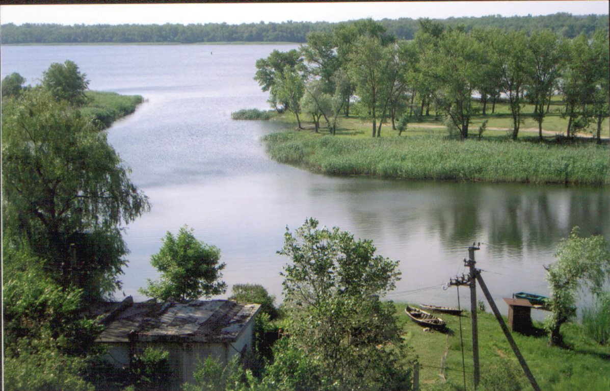 Остров